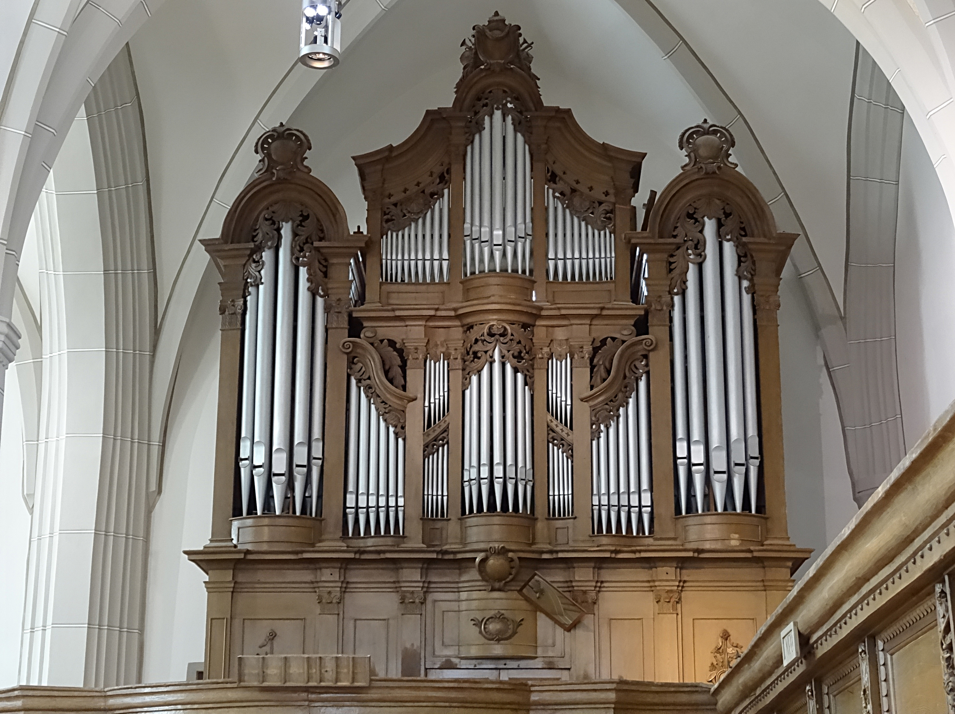 Orgel der Zittauer Klosterkirche im Prospekt von Valentin Englert (1791)